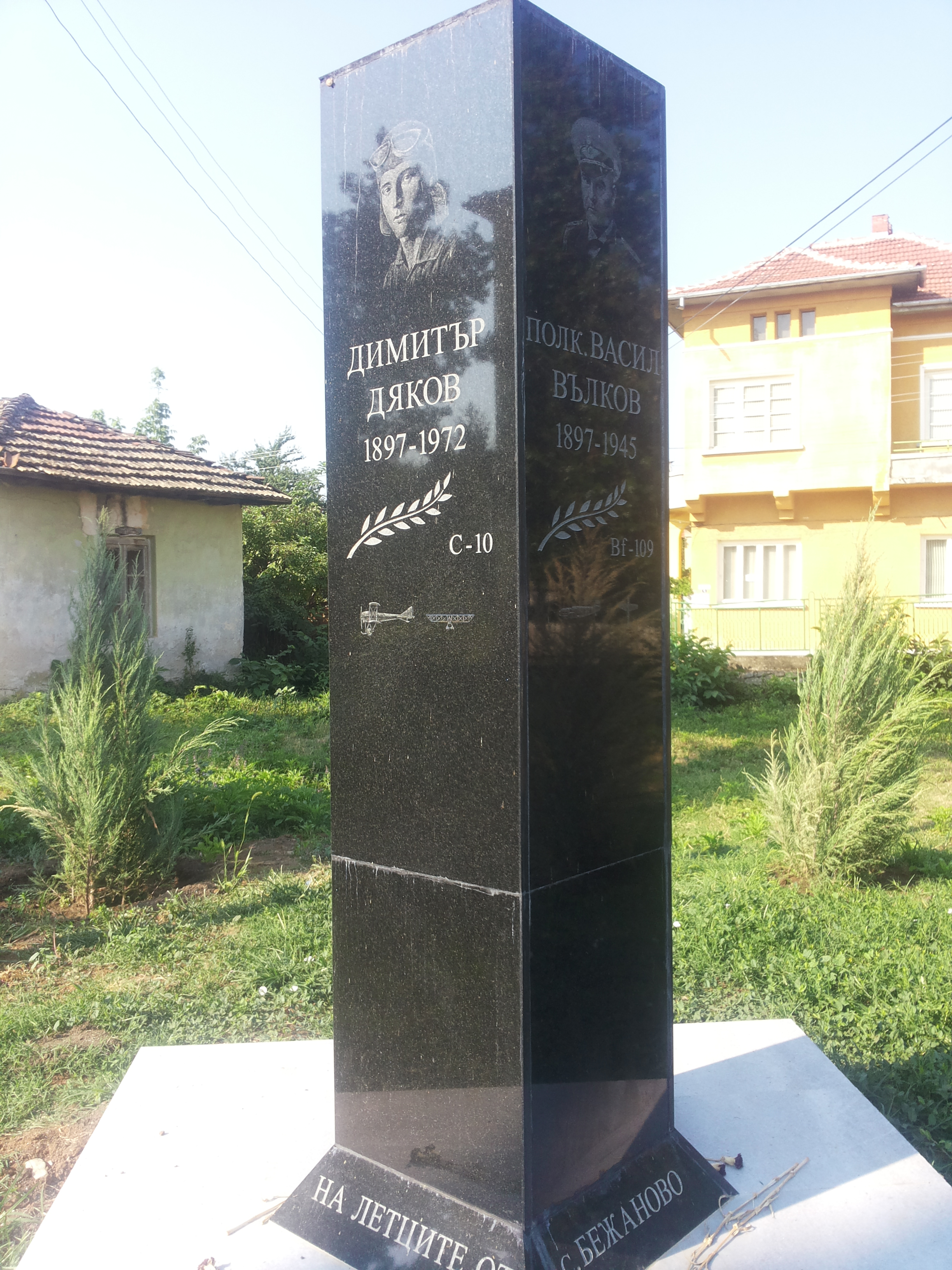 Село Бежаново,община Луковитска.Паметник на летците.